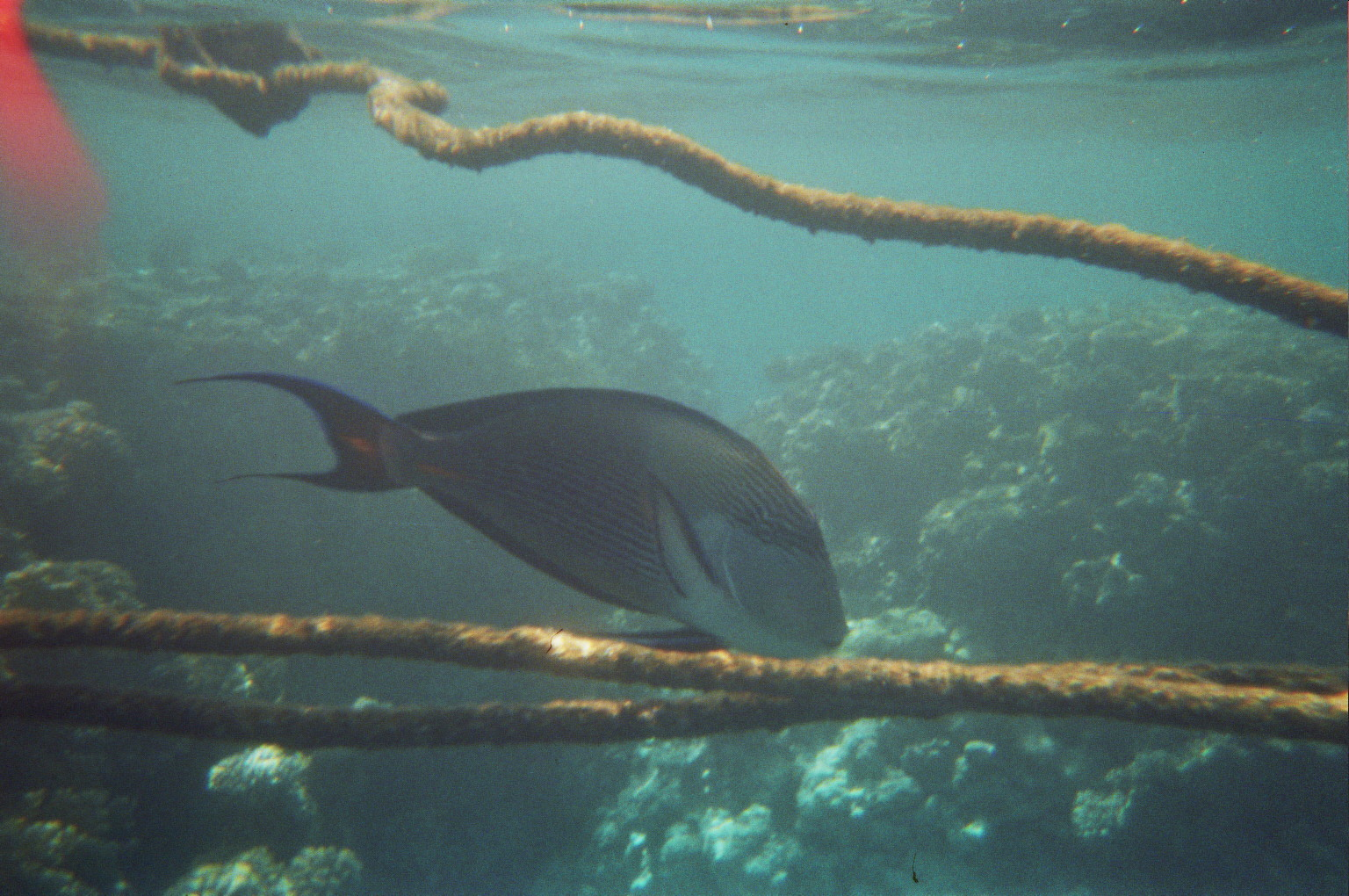 Naso lituratus